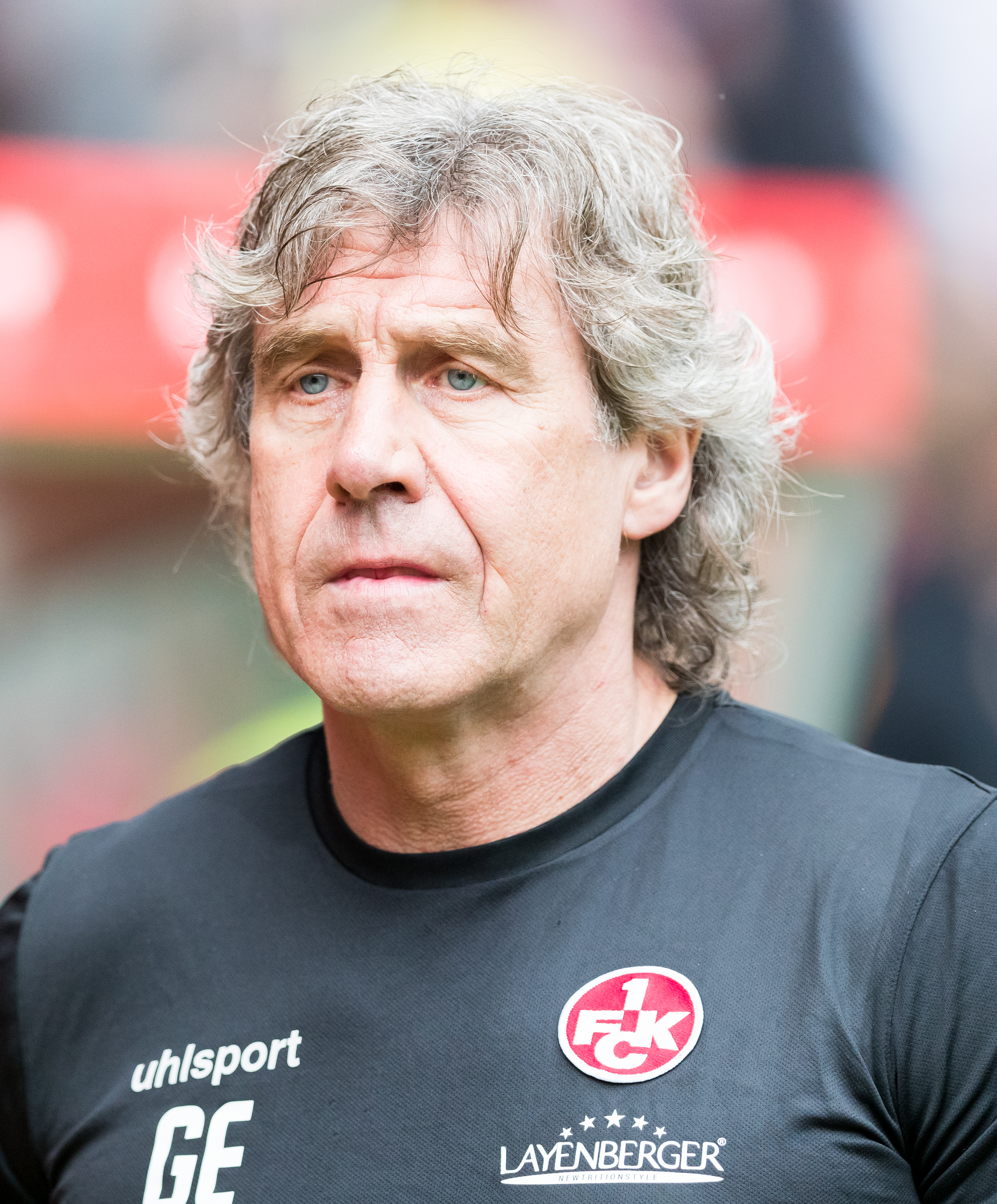 during 1.FC Kaiserslautern vs FC Bayern München at Fritz-Walter-Stadion, Kaiserslautern, Rheinland-Pfalz, Germany on 2019-05-27, Photo: Sven Mandel